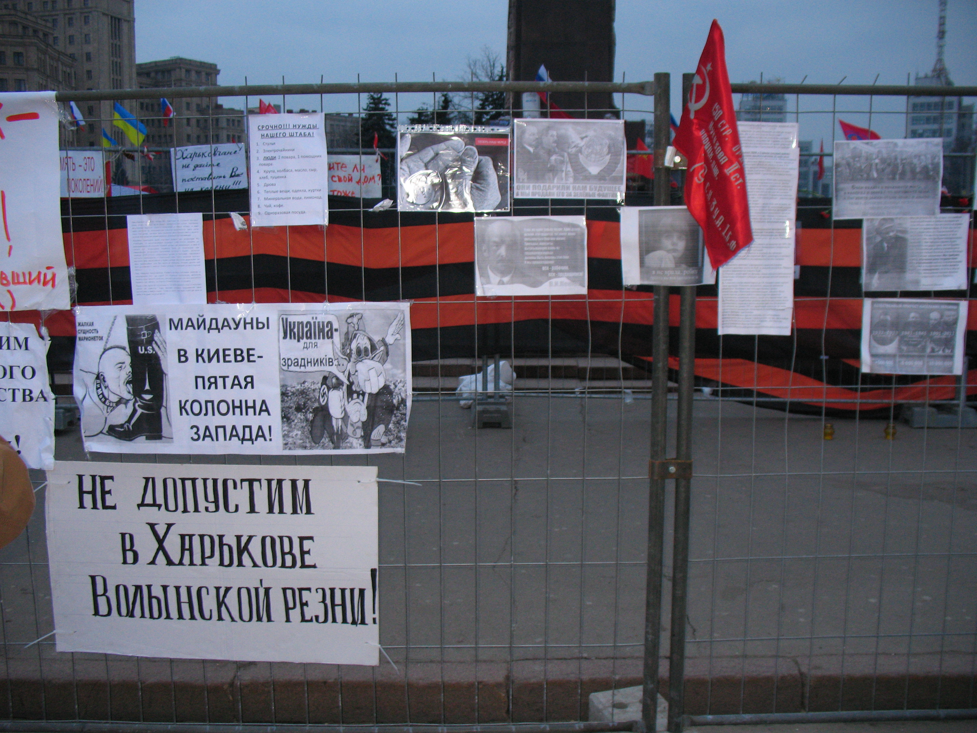 Харьков, 1 марта. Защита памятника Ленину горожанами от боевиков "Правого сектора", которые пытаются его снести. "Не допустим в Харькове Волынской резни!" Видно Знамя Победы.